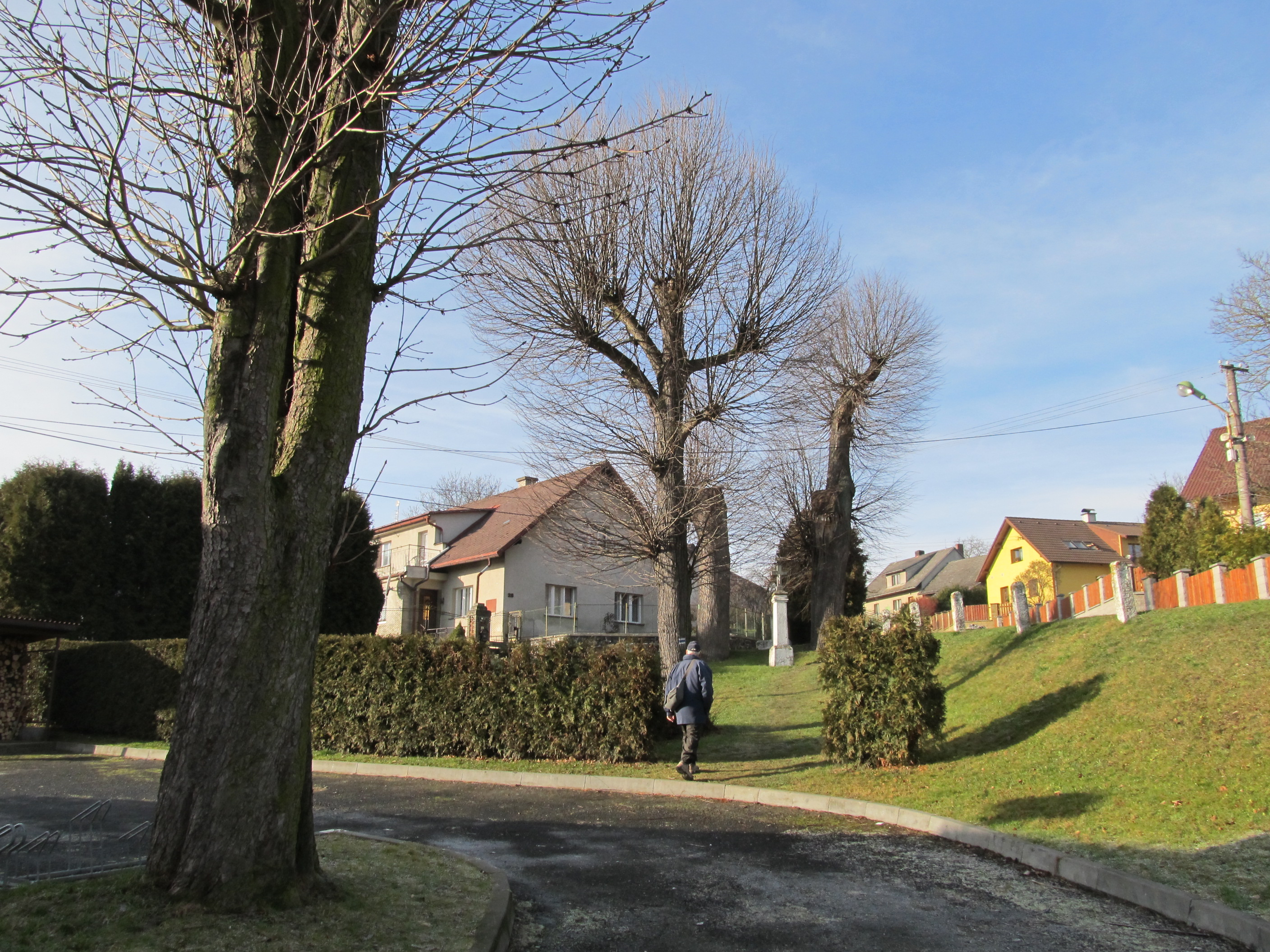 Soustov - náves